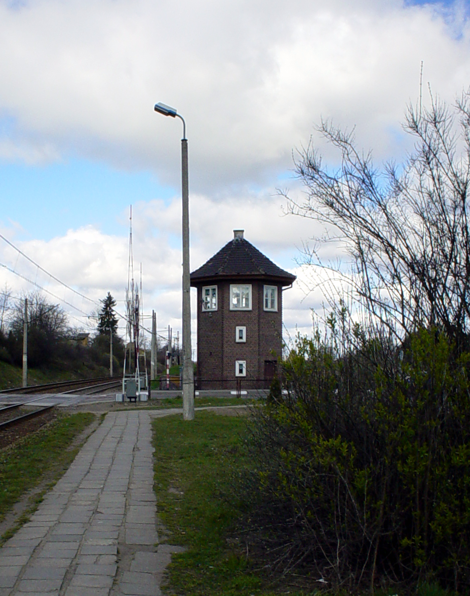 Strażnica kolejowa w Iłowie, powiat działdowski, woj. warmińsko-mazurskie